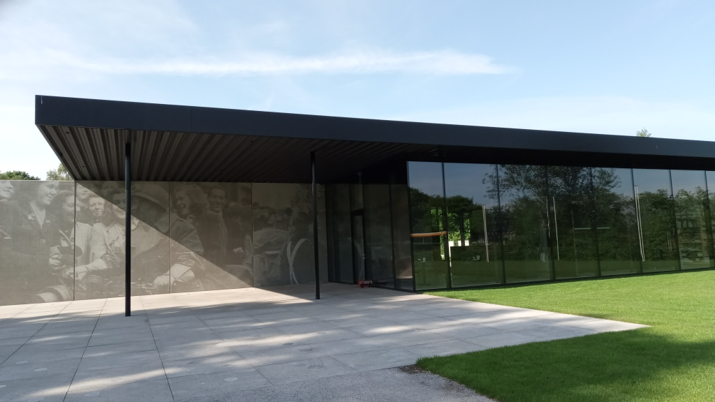 Maczek Memorial Breda, gelegen direct achter het Pools Militair Ereveld aan de Ettensebaan 17A, 4812 XA Breda